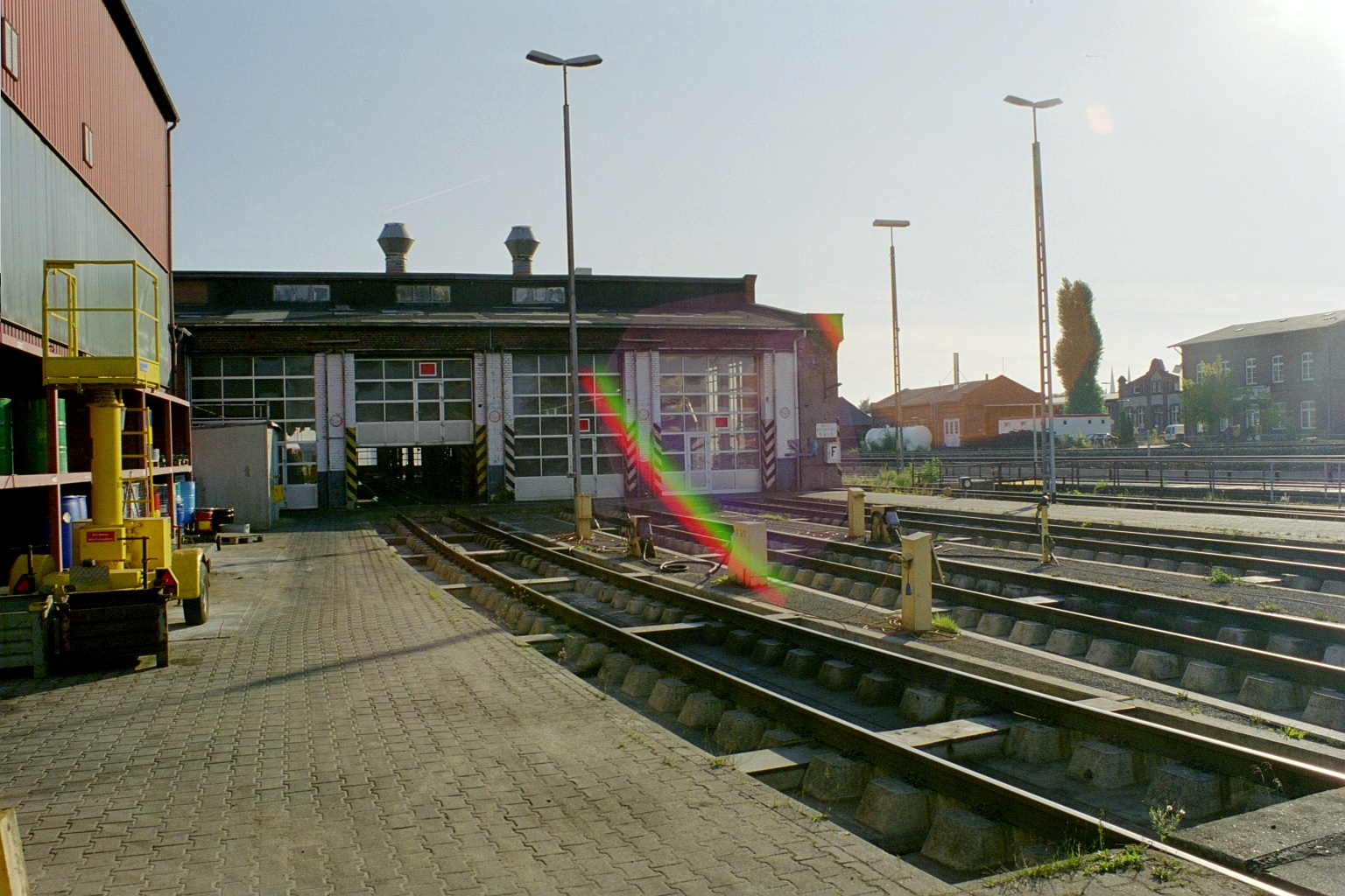 Rechteckhalle und Großtausch des Bw Lübecks